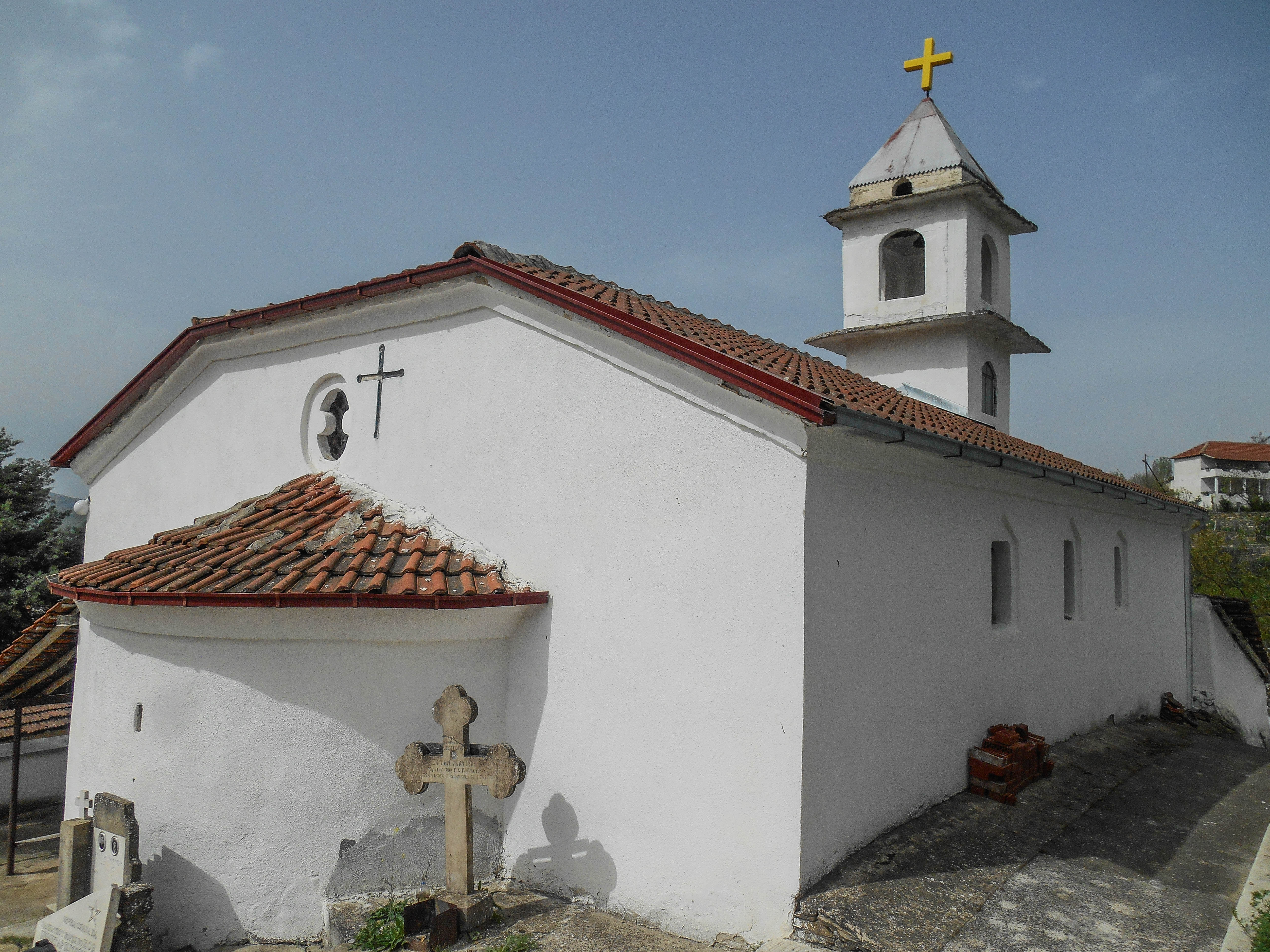 Црква Свети Илија